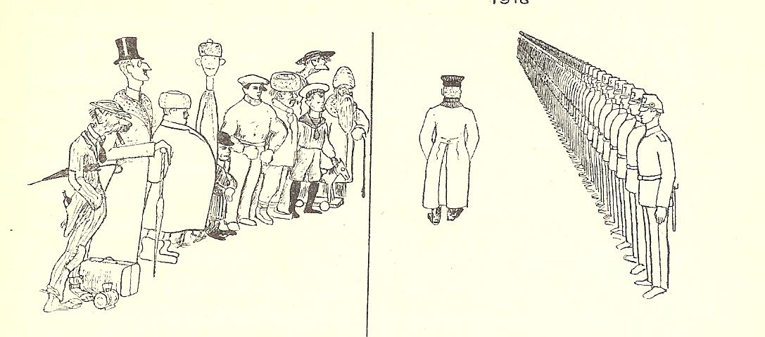 Före och efter inryckning. Skämtteckning av Gruppenführer Lauri Malmberg för jägarbataljonens pionkärkompanis program vid nyårsfesten 1916.